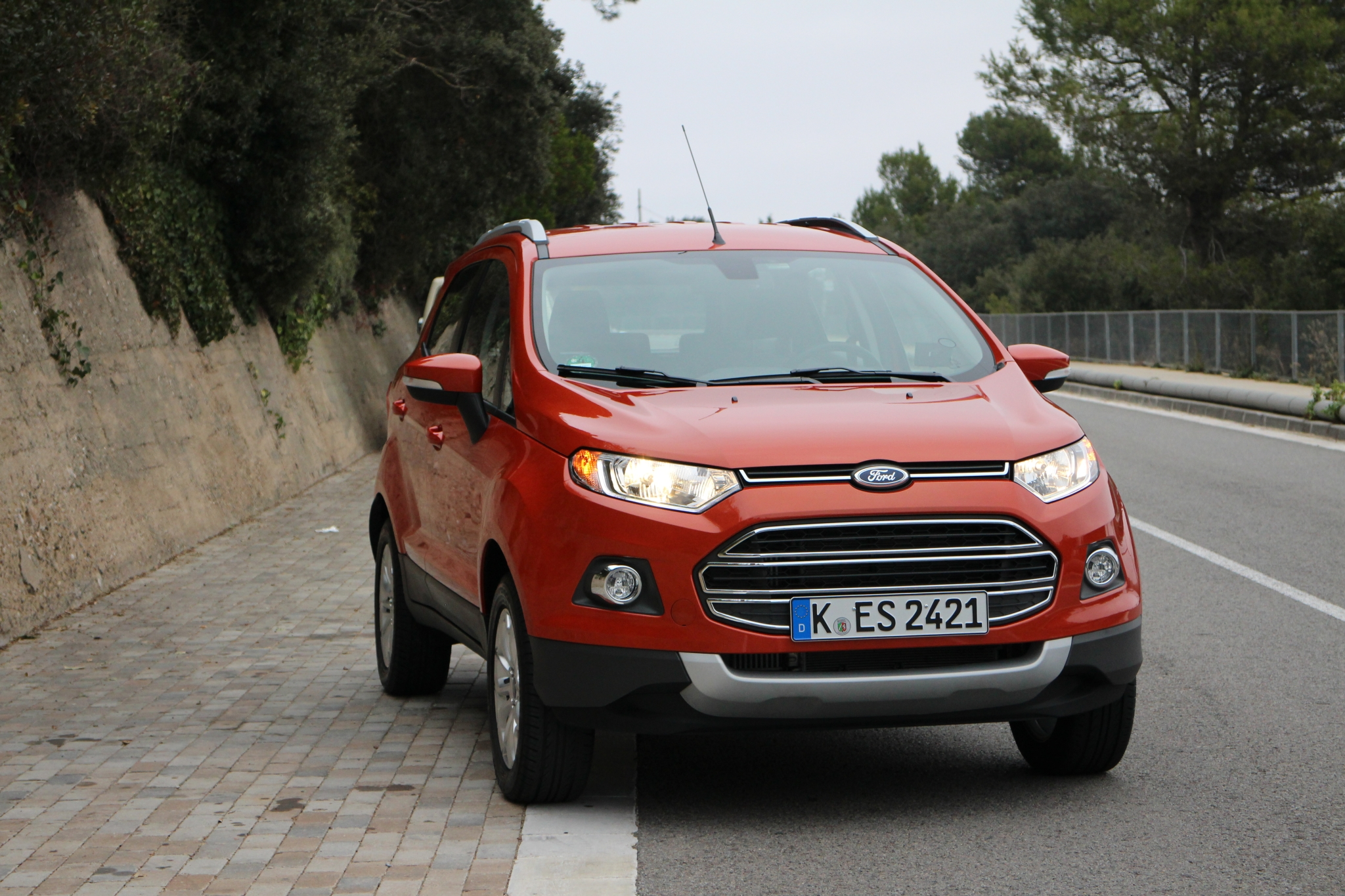 Ford EcoSport Diesel 2013